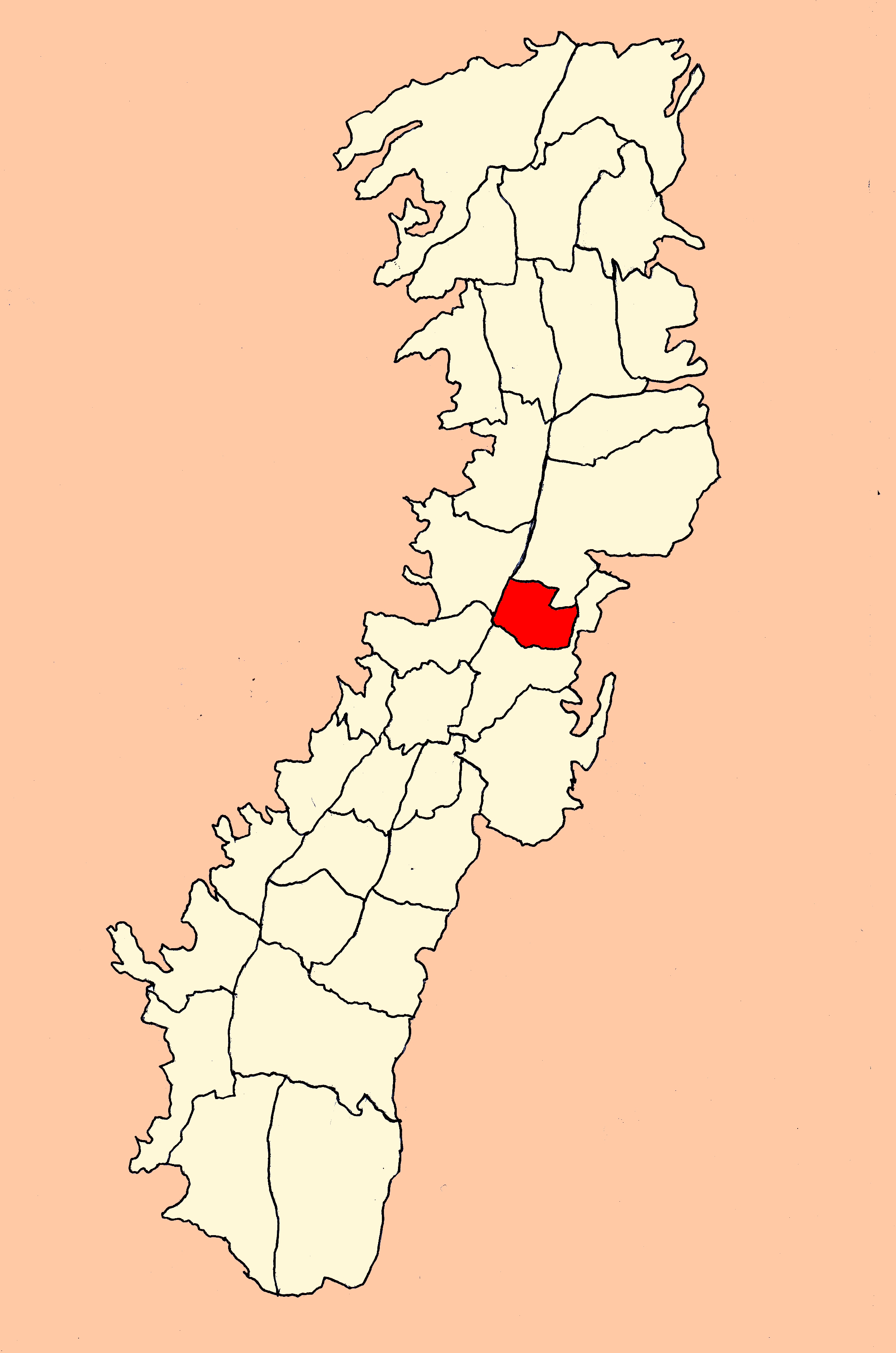 Parroquia Mariscal Sucre (Quito, Ecuador)